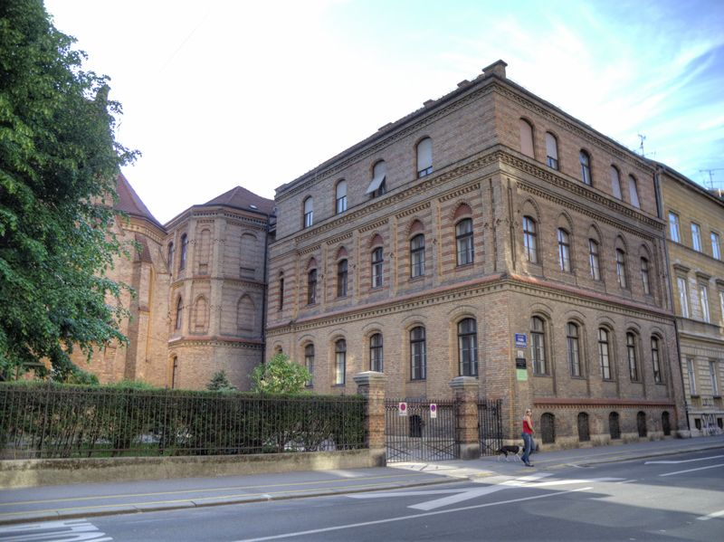 Zagreb